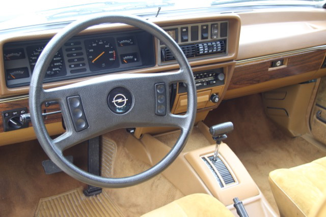 Opel Monza - 1.Serie aus 1978